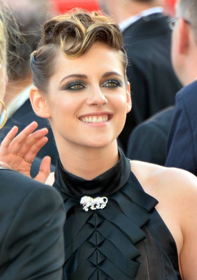 Kristen Stewart au festival de Cannes.